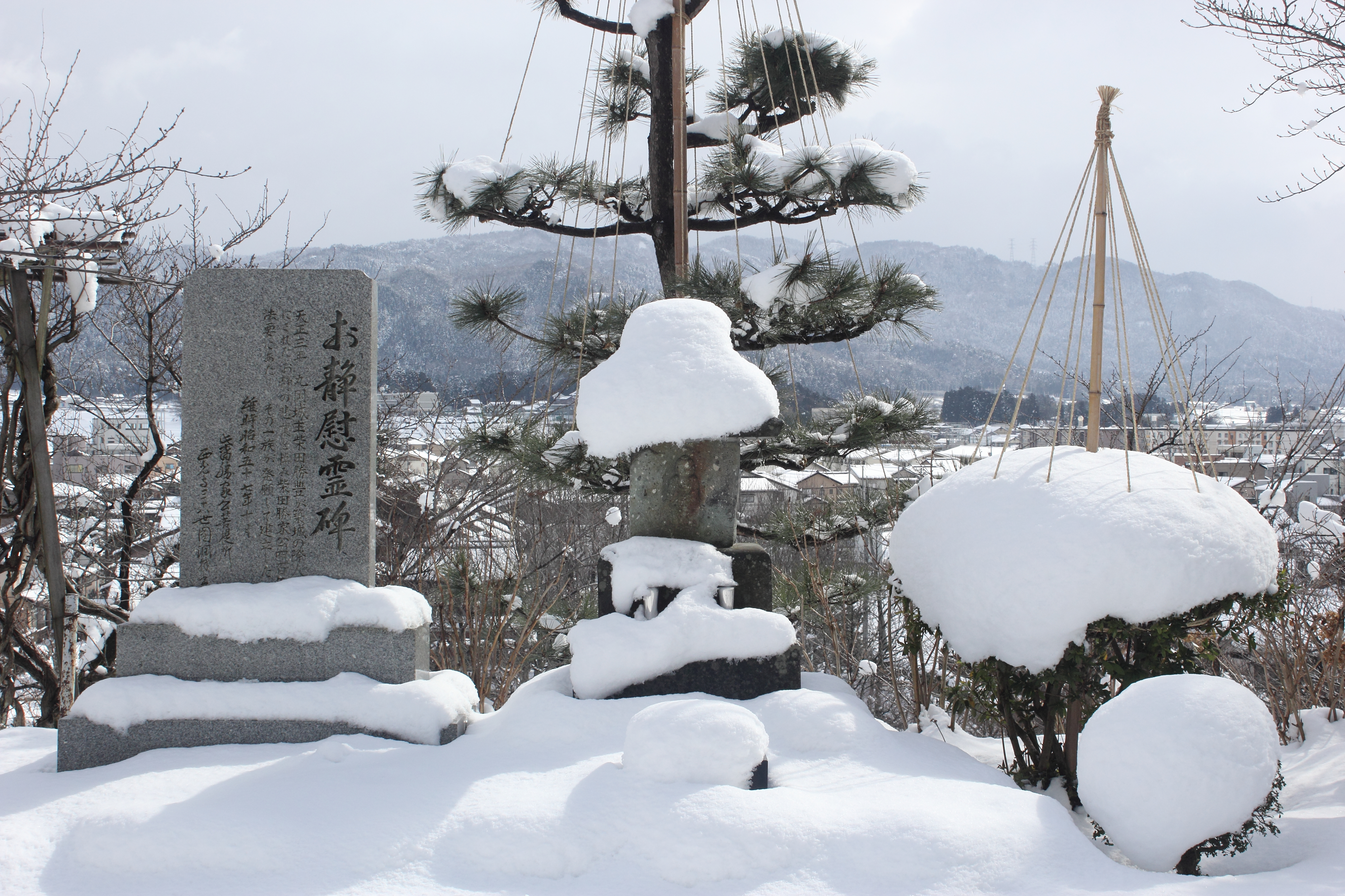 丸岡城内にあるお静の慰霊碑